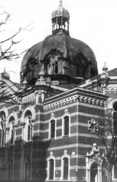 Synagoga v Olomouci. V noci z 15. na 16. března 1939 byla vypálena německými nacisty